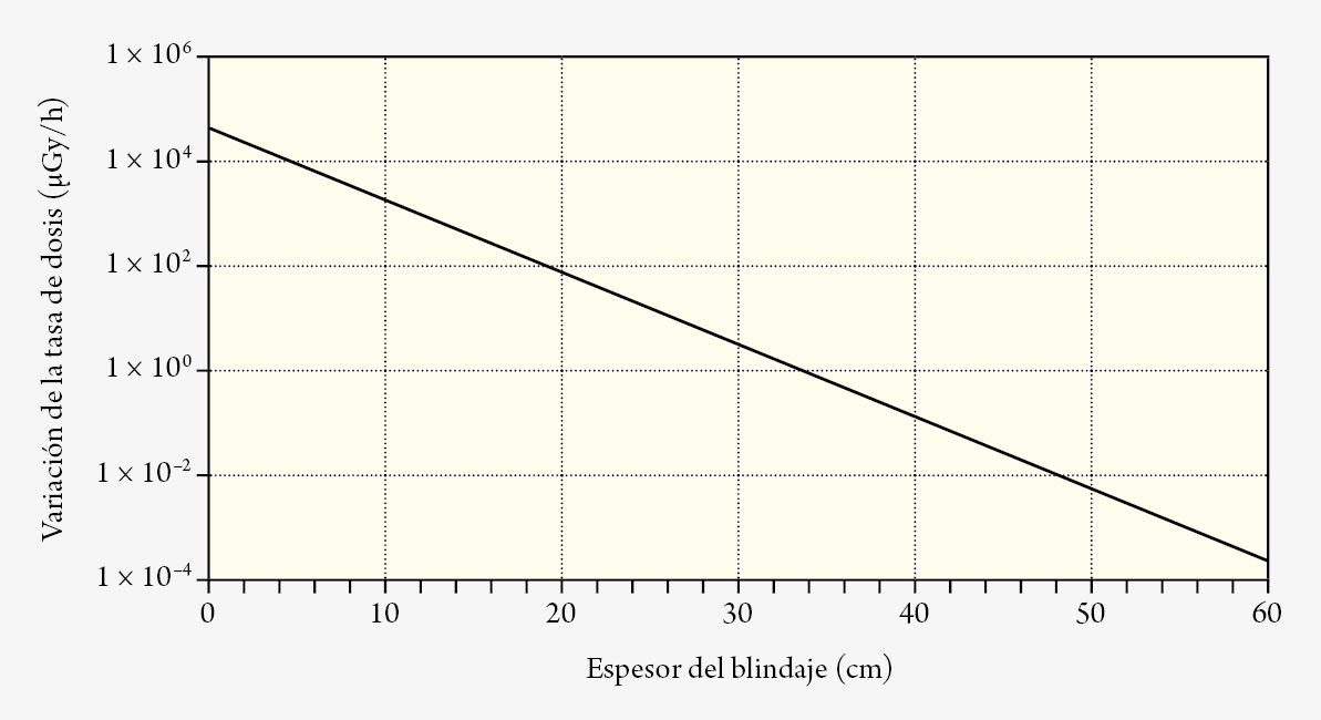 Es una gráfica ilustrativa para el artículo de Blindaje Biológico